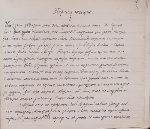 Ц. Гартны. Раман “Бацькава воля”. Ч. 1. Аўтограф. 1921 г.